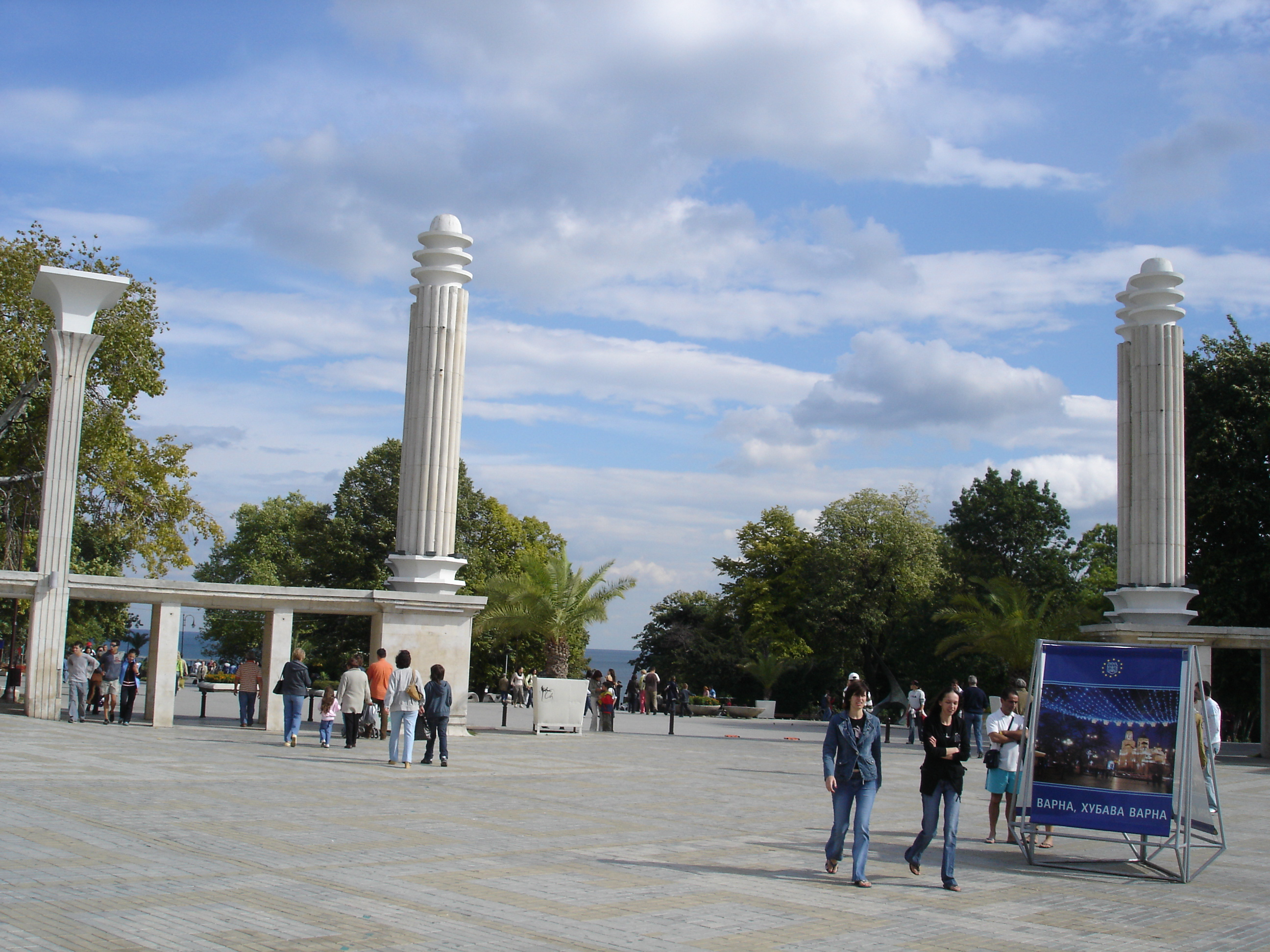 Sea Garden in Varna, Bulgaria